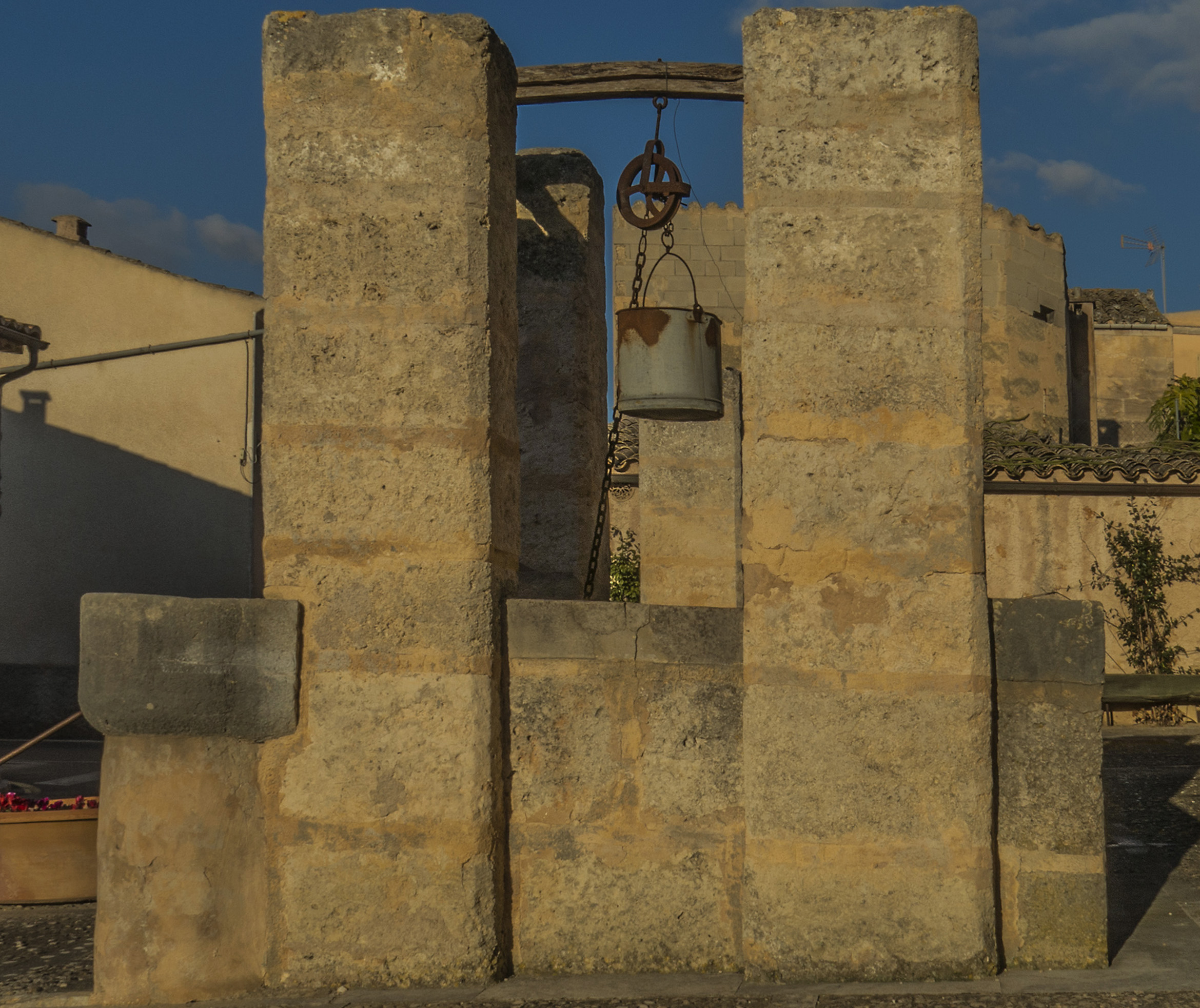 Municipi de Mallorca situat al centre de l'illa.